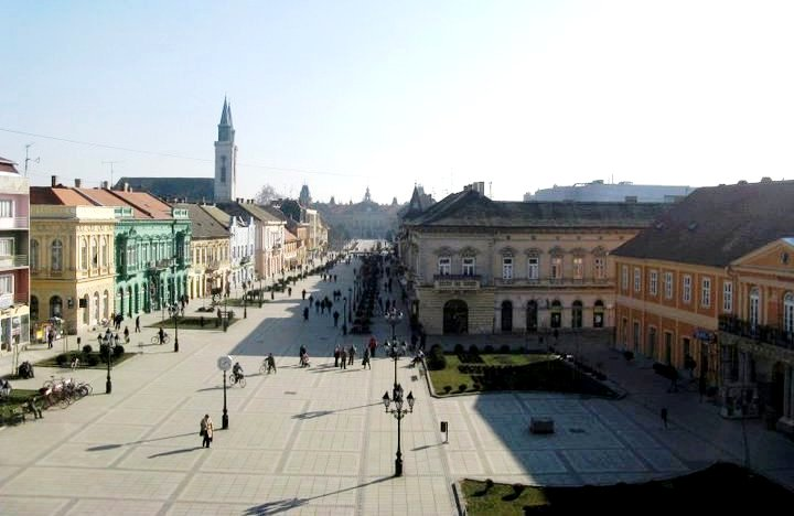 Пешачка улица у Сомбору.